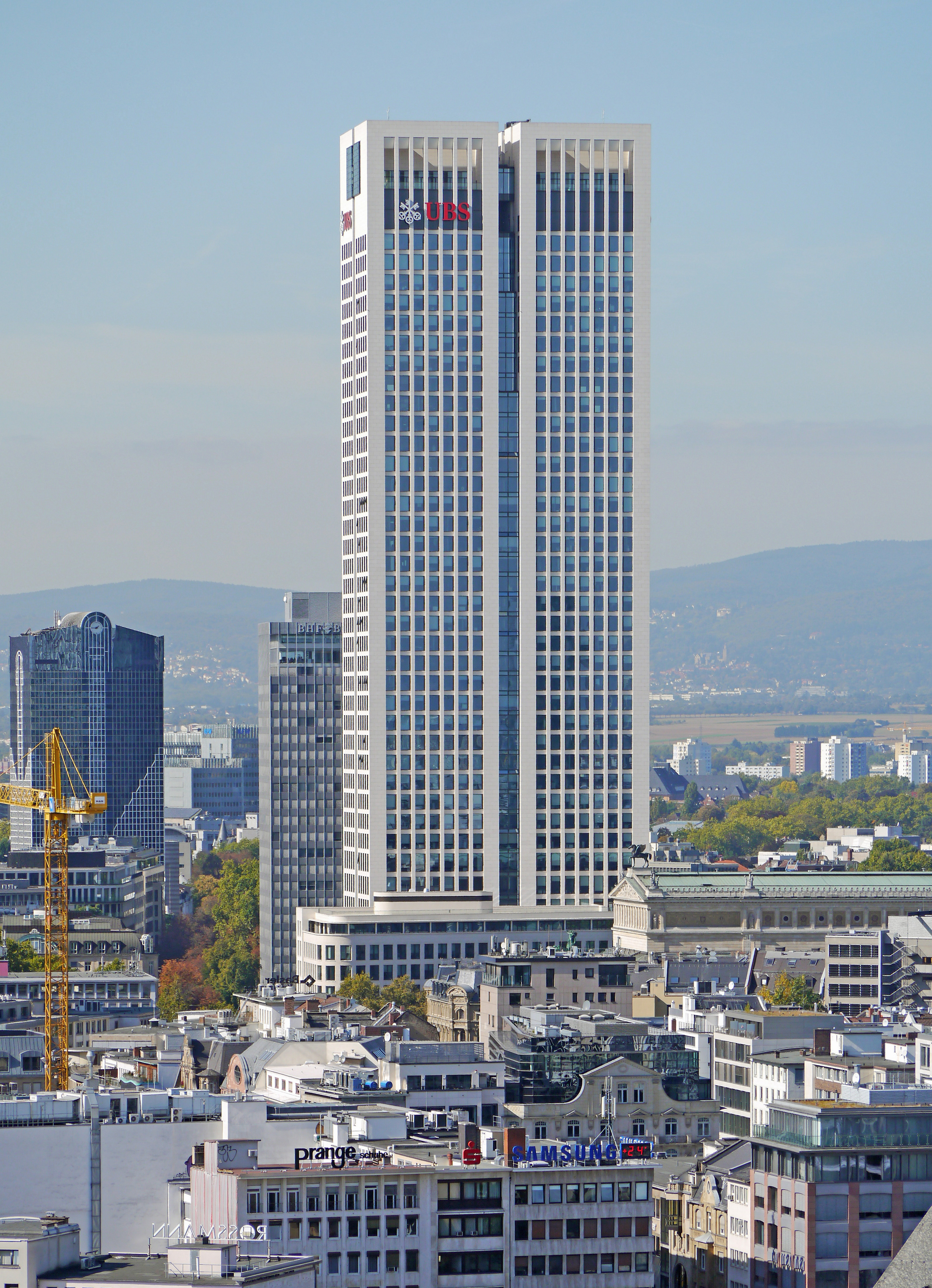 Der Opernturm (2012), Ecke "Bockenheimer Landstrass-Taunusanlage" gegenüber der Alten Oper in Frankfurt-Westend. Blick vom Kaiserdom St. Bartholomäus.